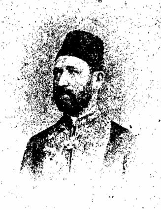 إبراهيم باشا حسن (1844 ـ 1917)، مفتش الصحة العمومية وناظر مدرسة طب قصر العيني في أواخر القرن التاسع عشر.